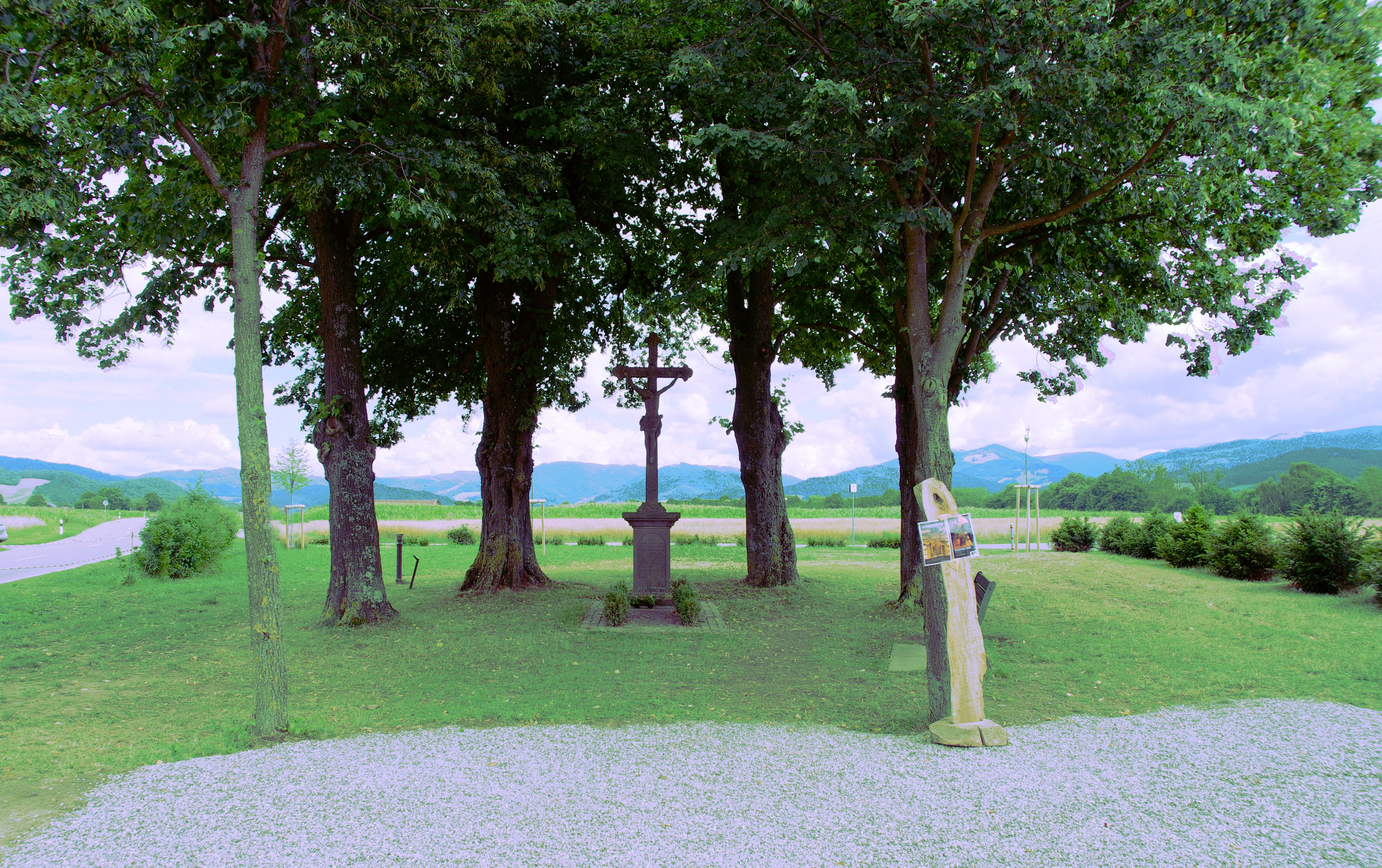 Das Steinkreuz unter den Linden bei der Anna Kapelle Ebnet